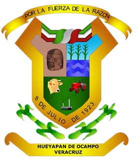 Escudo de Hueyapan